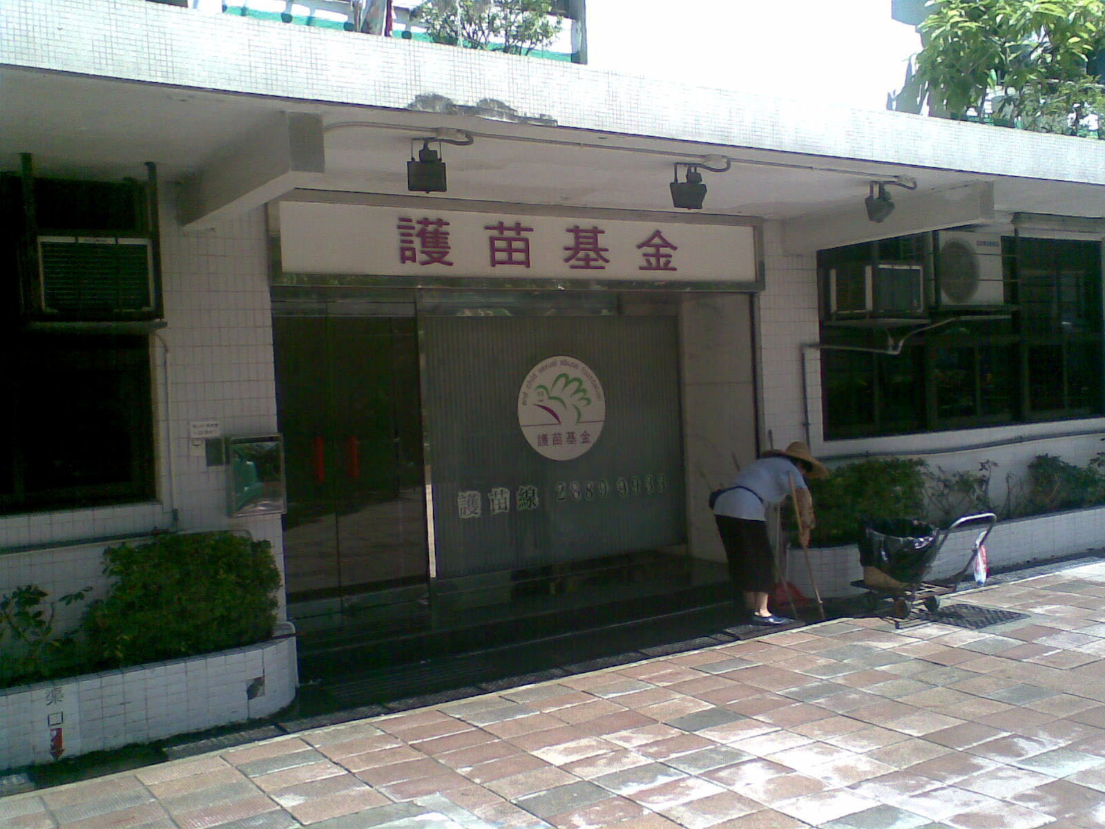 護苗基金南山邨總部